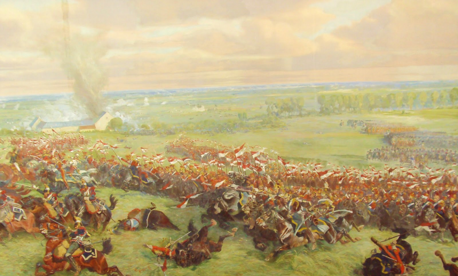 Charge de la cavalerie de la Garde impériale lors de la bataille de Waterloo. Au premier plan, les lanciers rouges de la Garde. Derrière eux, le régiment des chasseurs à cheval de la Garde qui forme avec les lanciers la division de cavalerie légère de la Garde commandée par Lefebvre-Desnouettes.